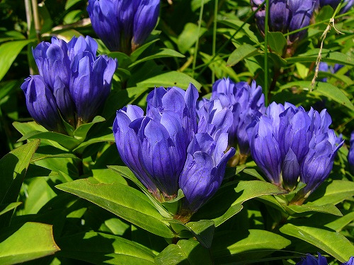 Gentiana triflora subsp. japonica (syn. Gentiana triflora var. montana)